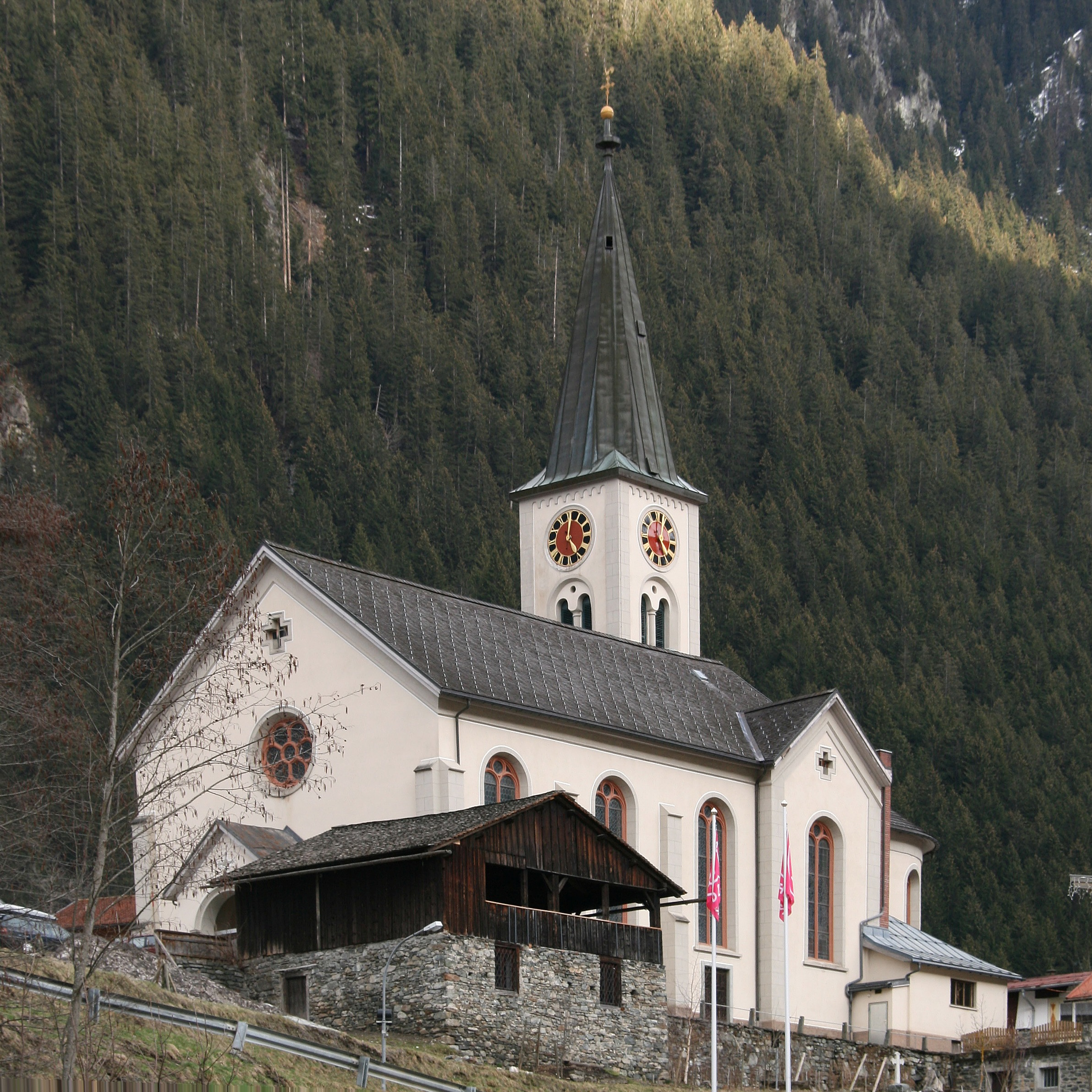 Pfarrkirche hl Erzengel Michael mit Tanzhaus/Versammlungsplatz im Vordergrund in Gaschurn,Vorarlberg